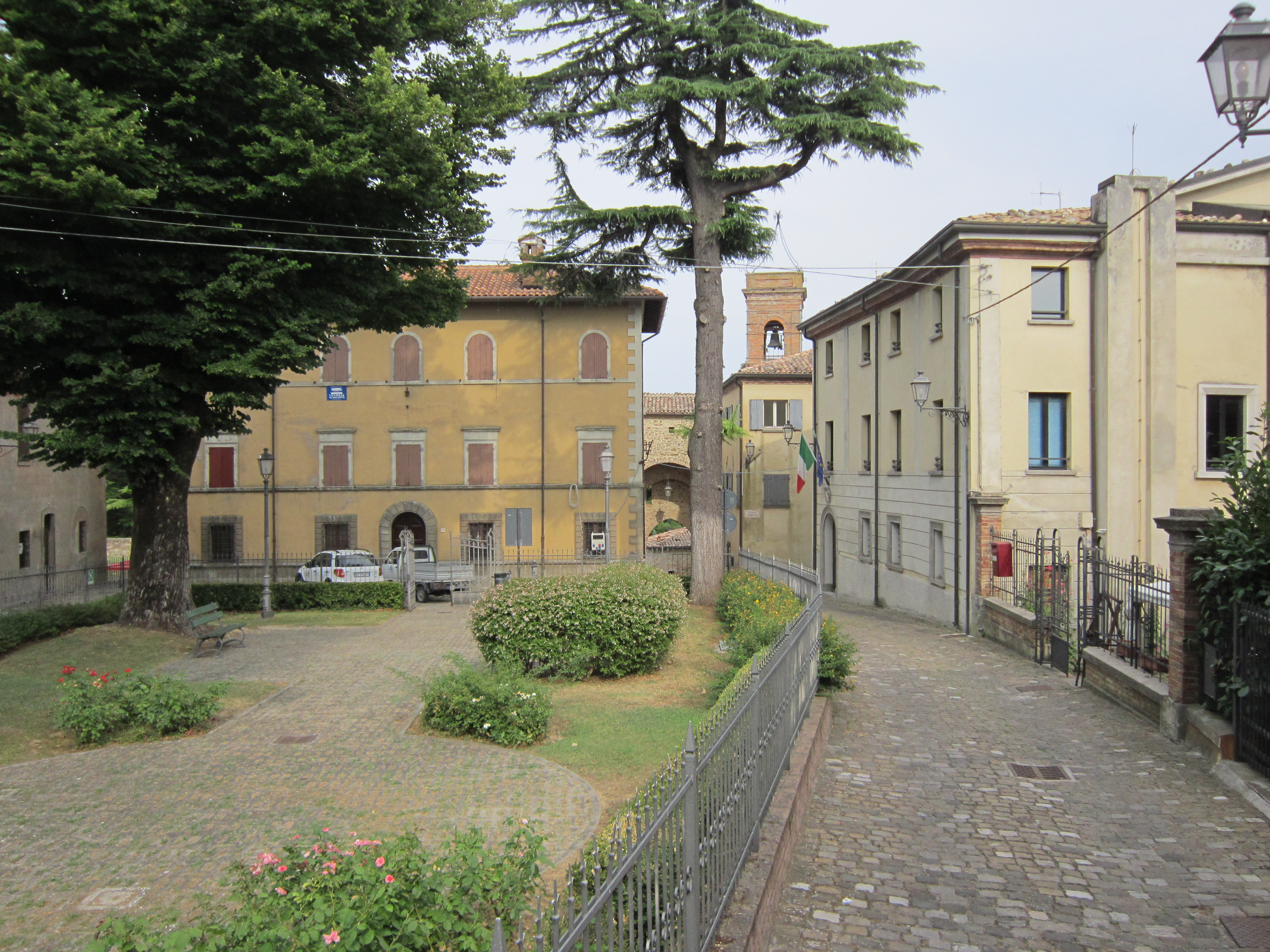 Piazza Malatesta a Monte Colombo (luglio 2015)